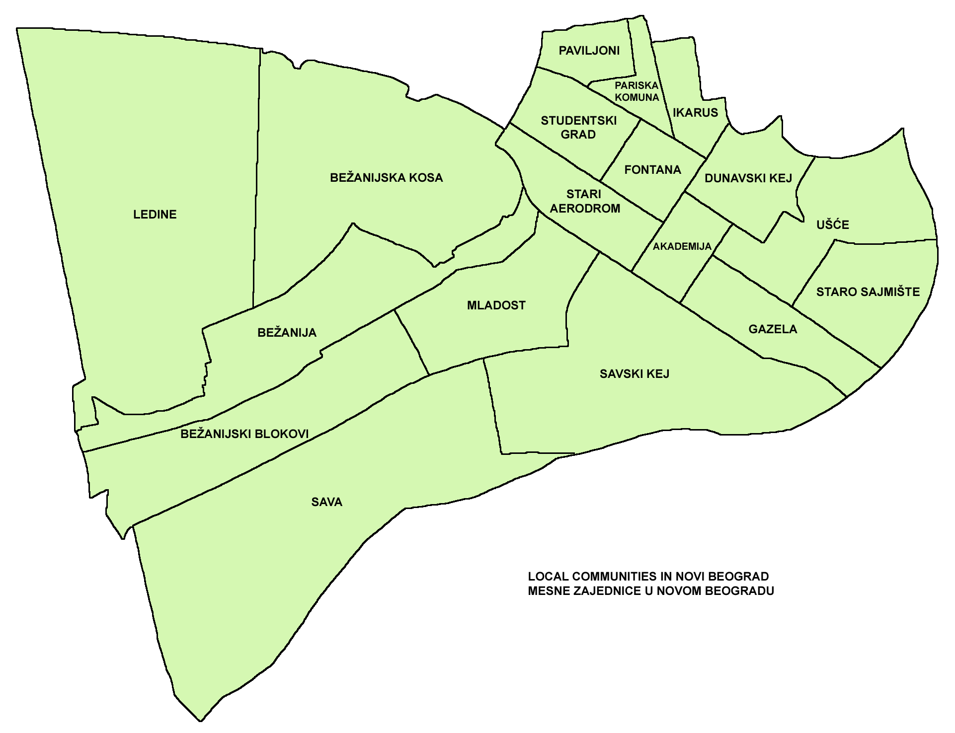 Local communities in Novi Beograd. Mesne zajednice u Novom Beogradu.